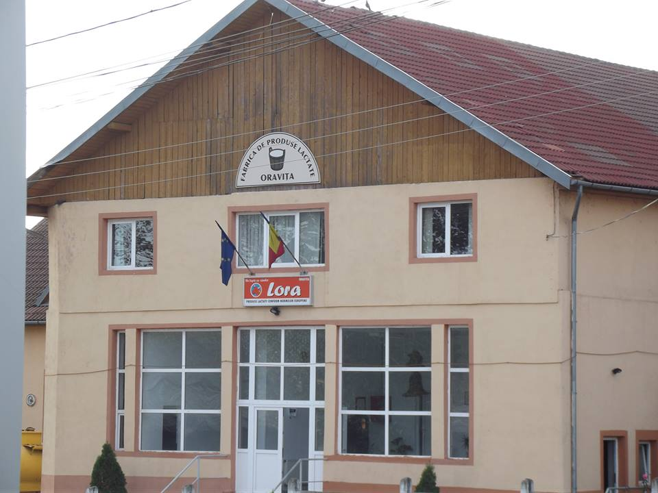 78.1 KB